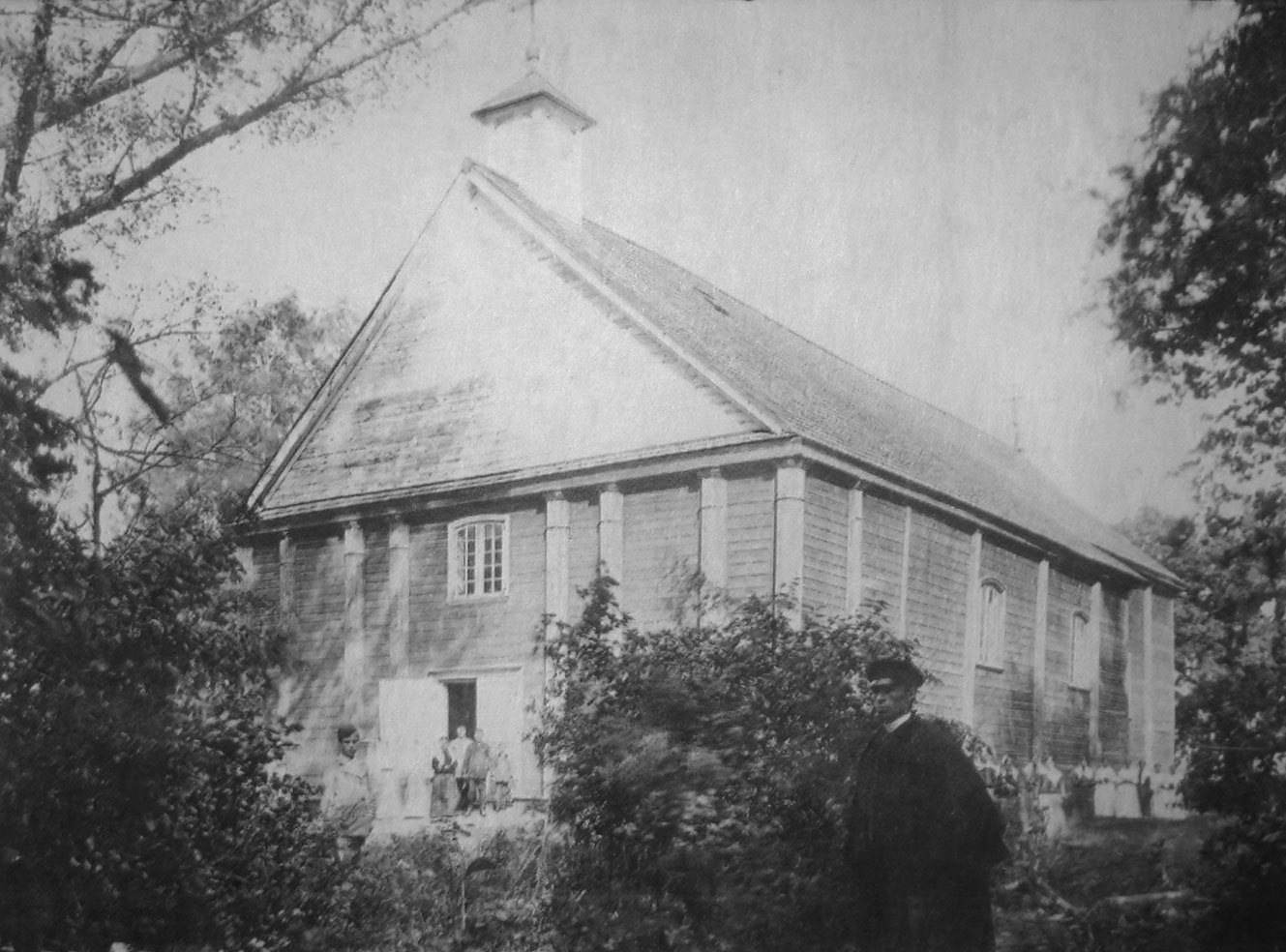 Беларуская (тарашкевіца): Шылавічы (Šyłavičy). Стары касьцёл